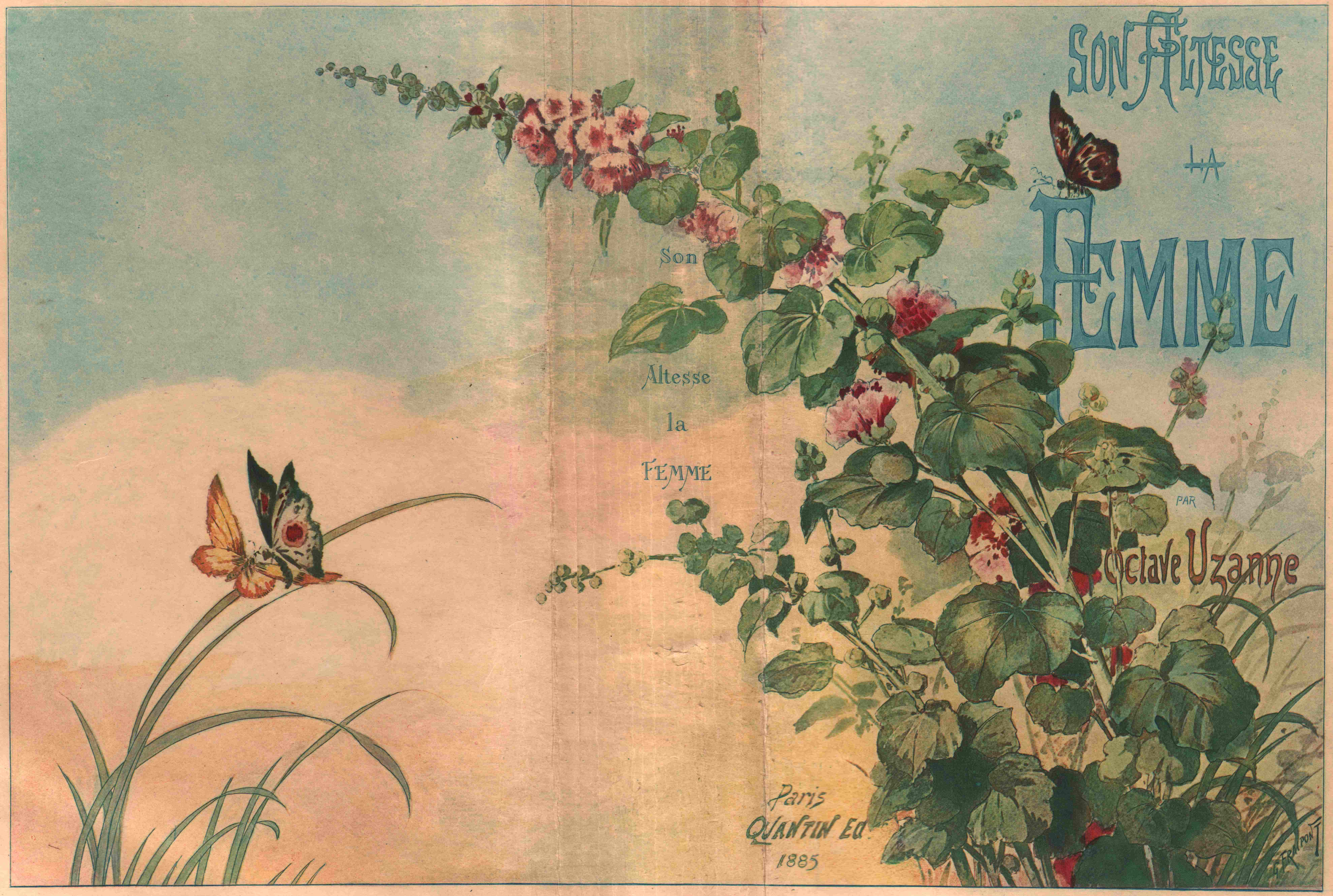 Couverture du livre d'Octave Uzanne, Son altesse la femme